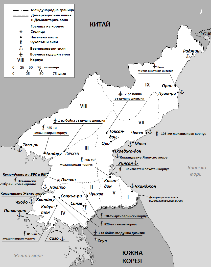 Разположение на дивизии, въздушни дивизии и военноморски бази на Корейската народна армия. Базирана на North Korea Country Study (2009), Library of Congress, стр. 246.